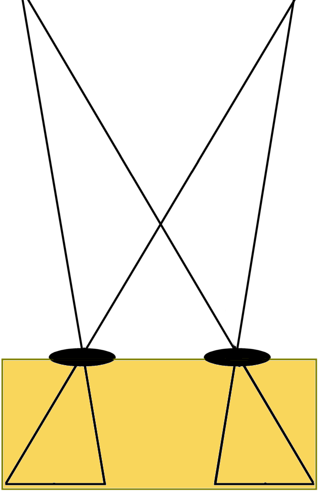 Stereocamera